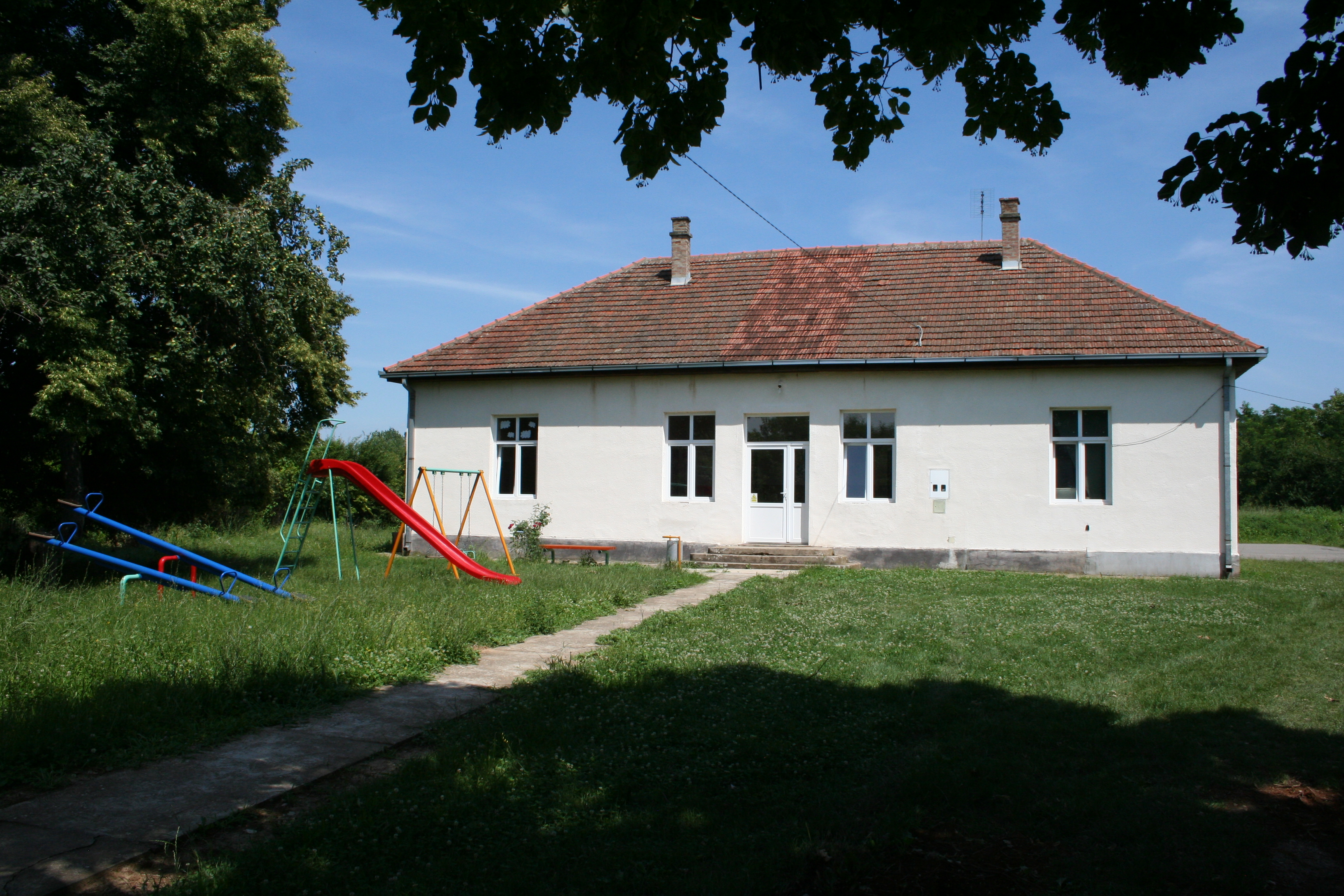 Zgrada škole, Orašac